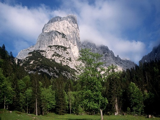 Totenkirchl, Alps (Austria).